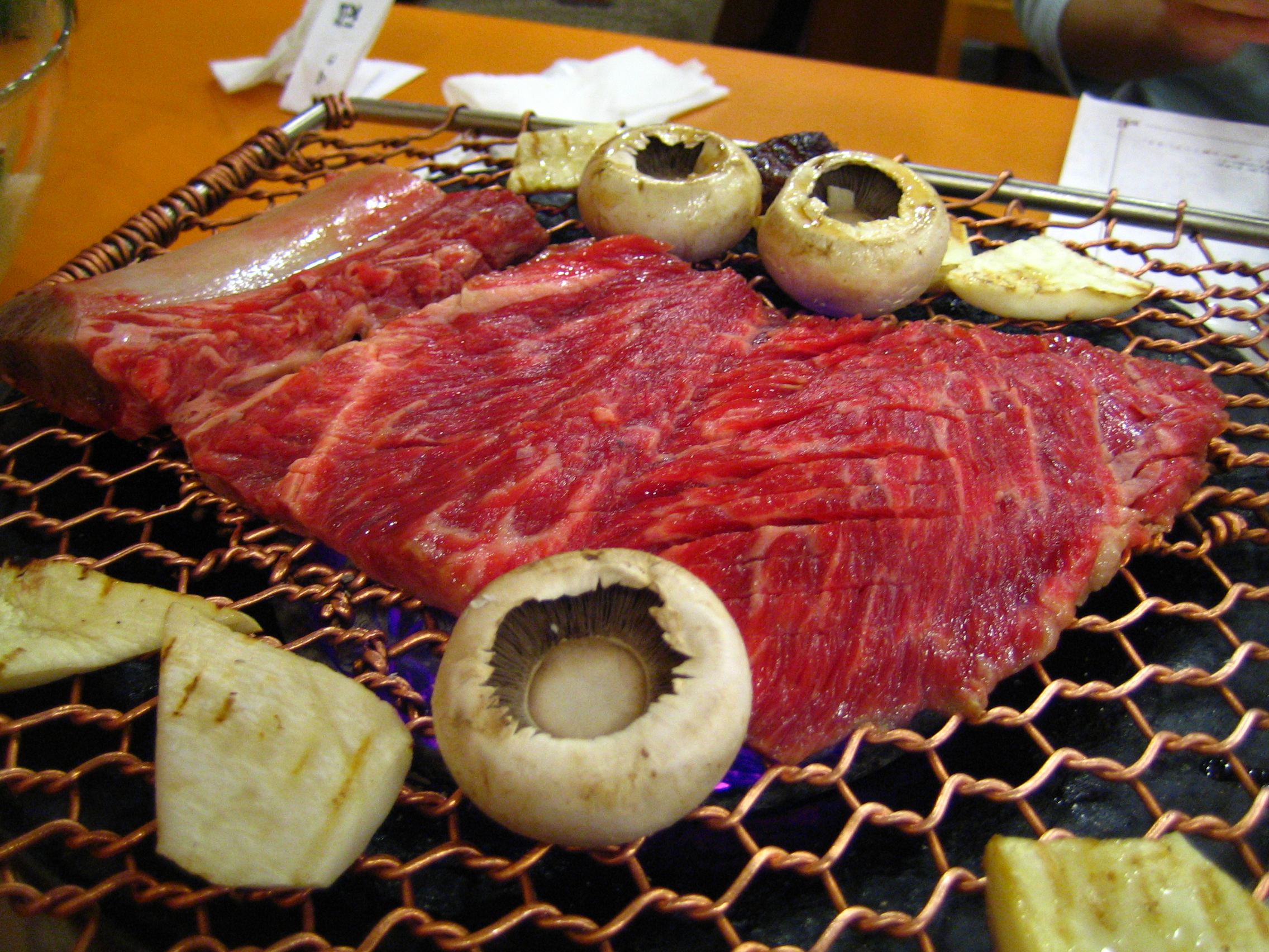 Galbi in Korean cuisine